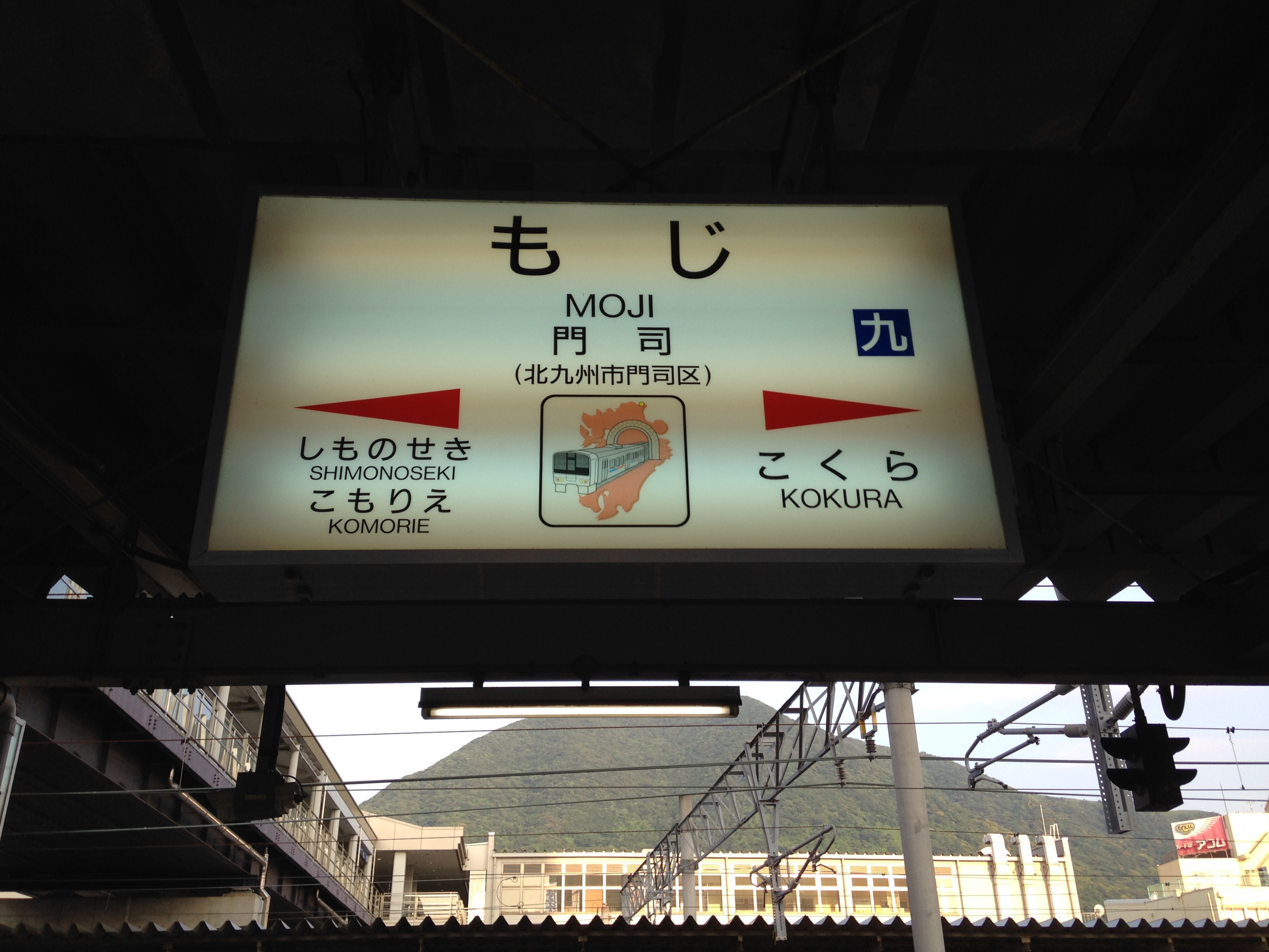 門司駅の駅名標。イラストは九州の玄関口・関門トンネル